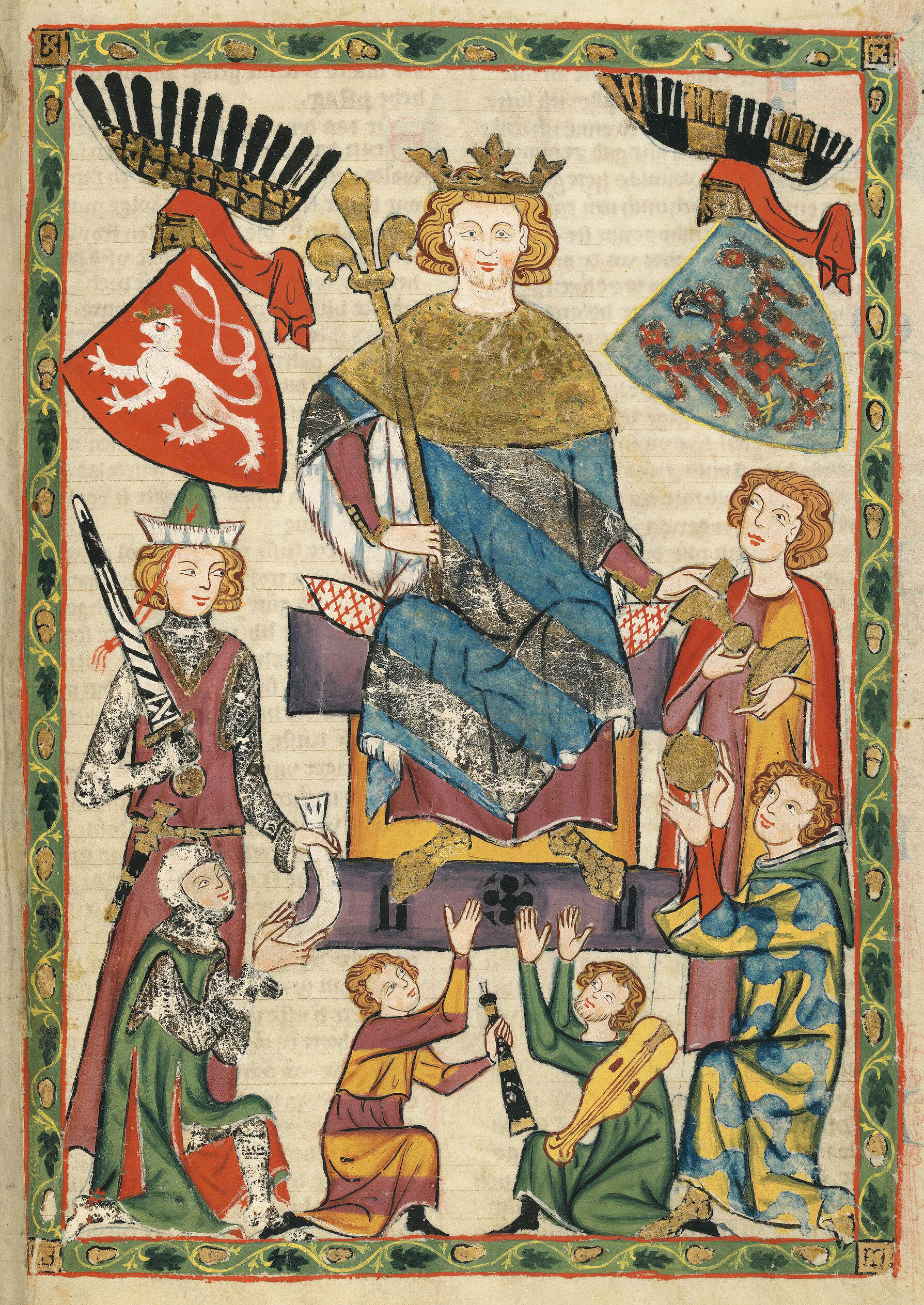 Codex Manesse, UB Heidelberg, Cod. Pal. germ. 848, fol. 10r, König Wenzel von Böhmen (= Vaclav II.)